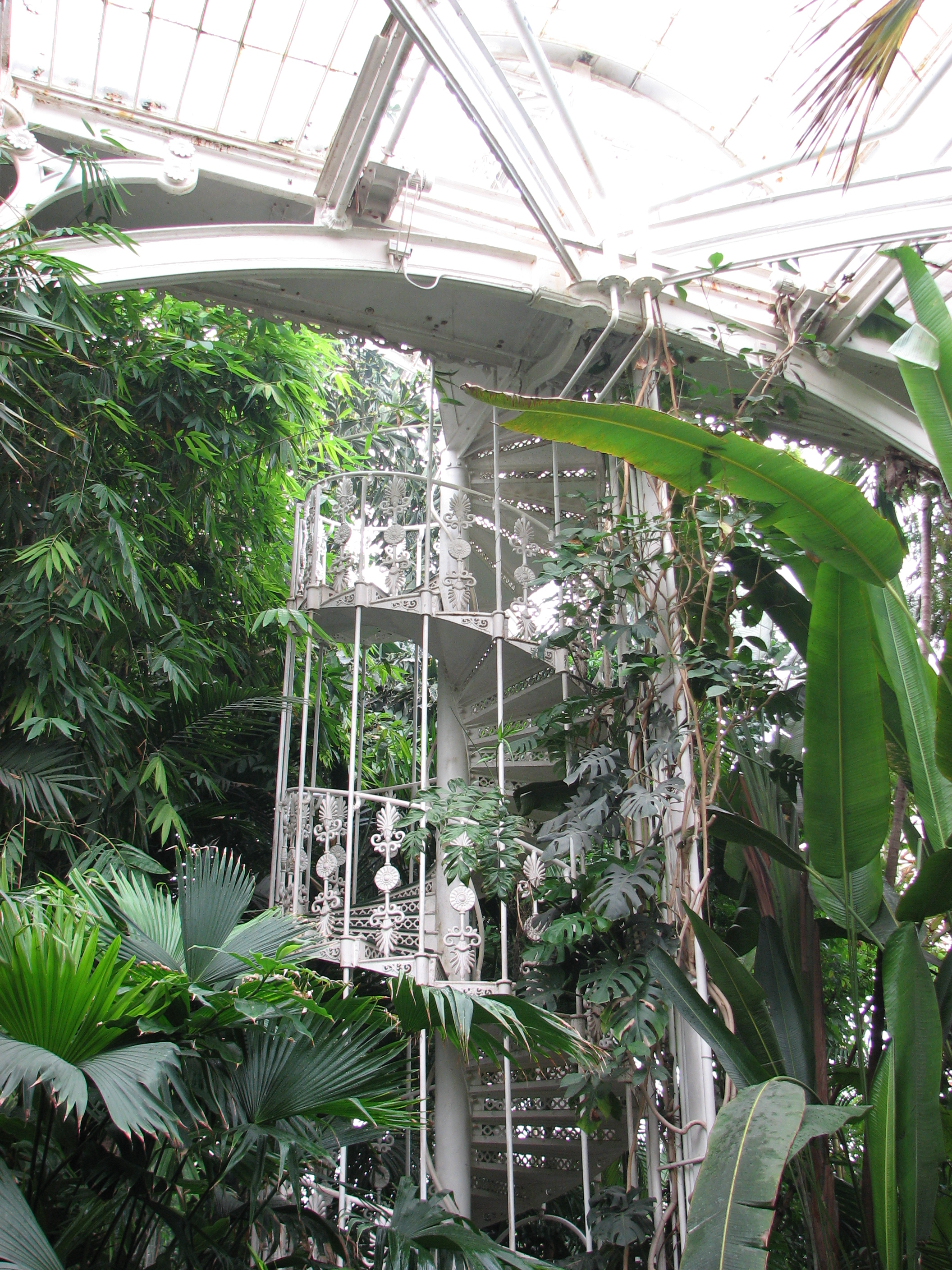 Kew Gardens - London - September 2008